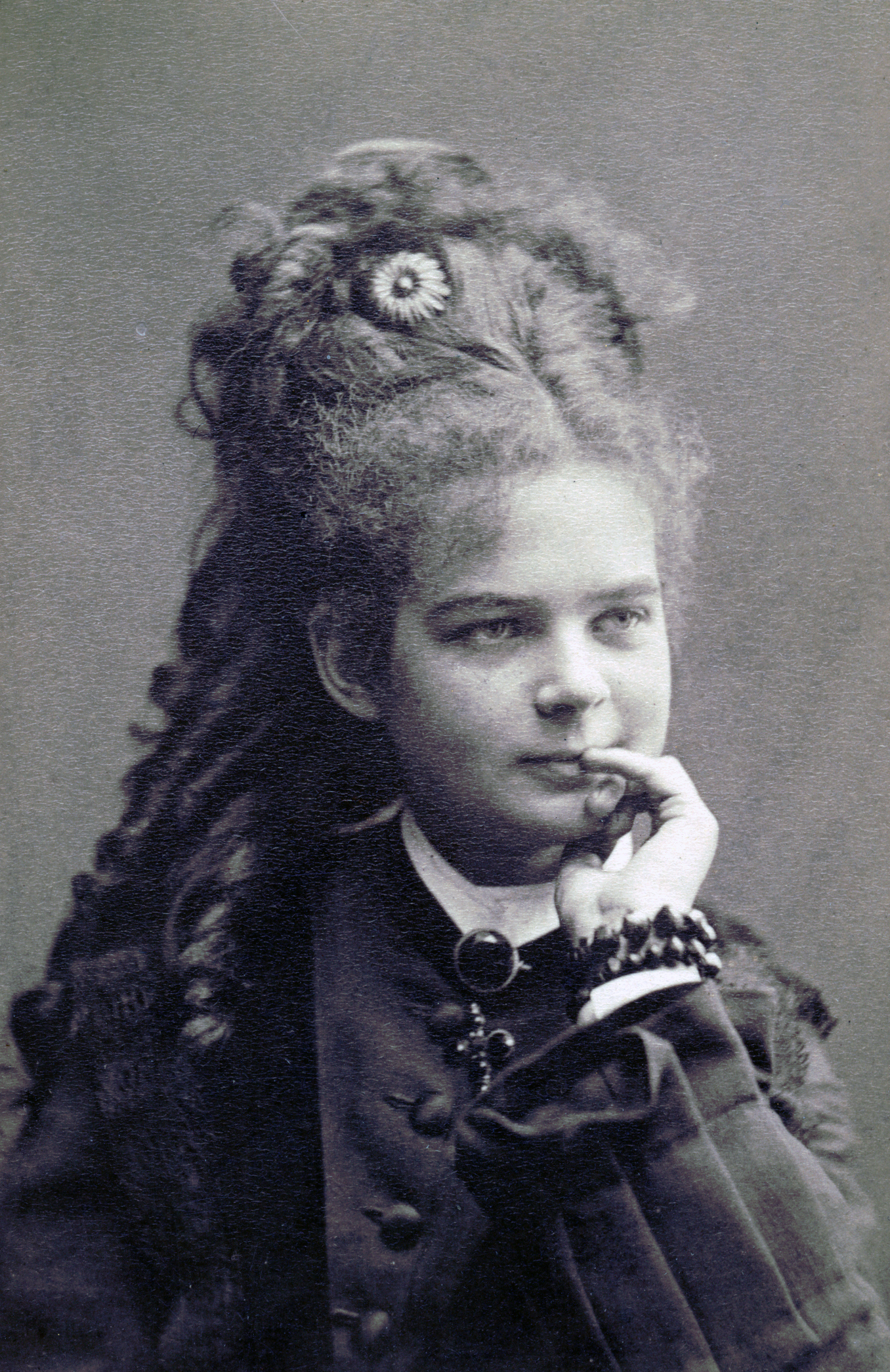 Ellen Ädelstam, skådespelare vid Kungliga Dramatiska teatern 1876